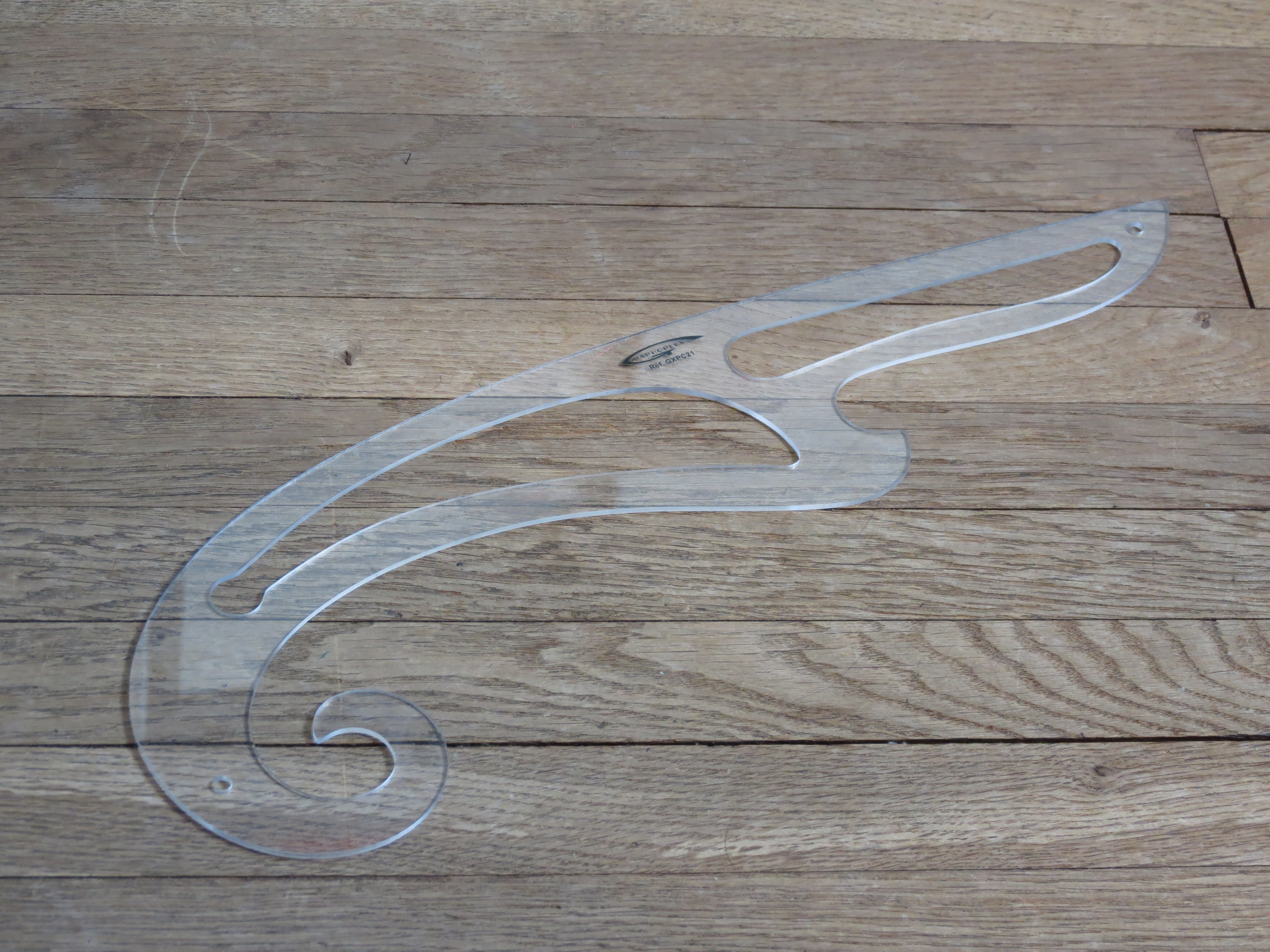 Perroquet (règle courbe)